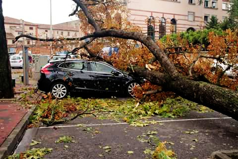 Degat montauban orage